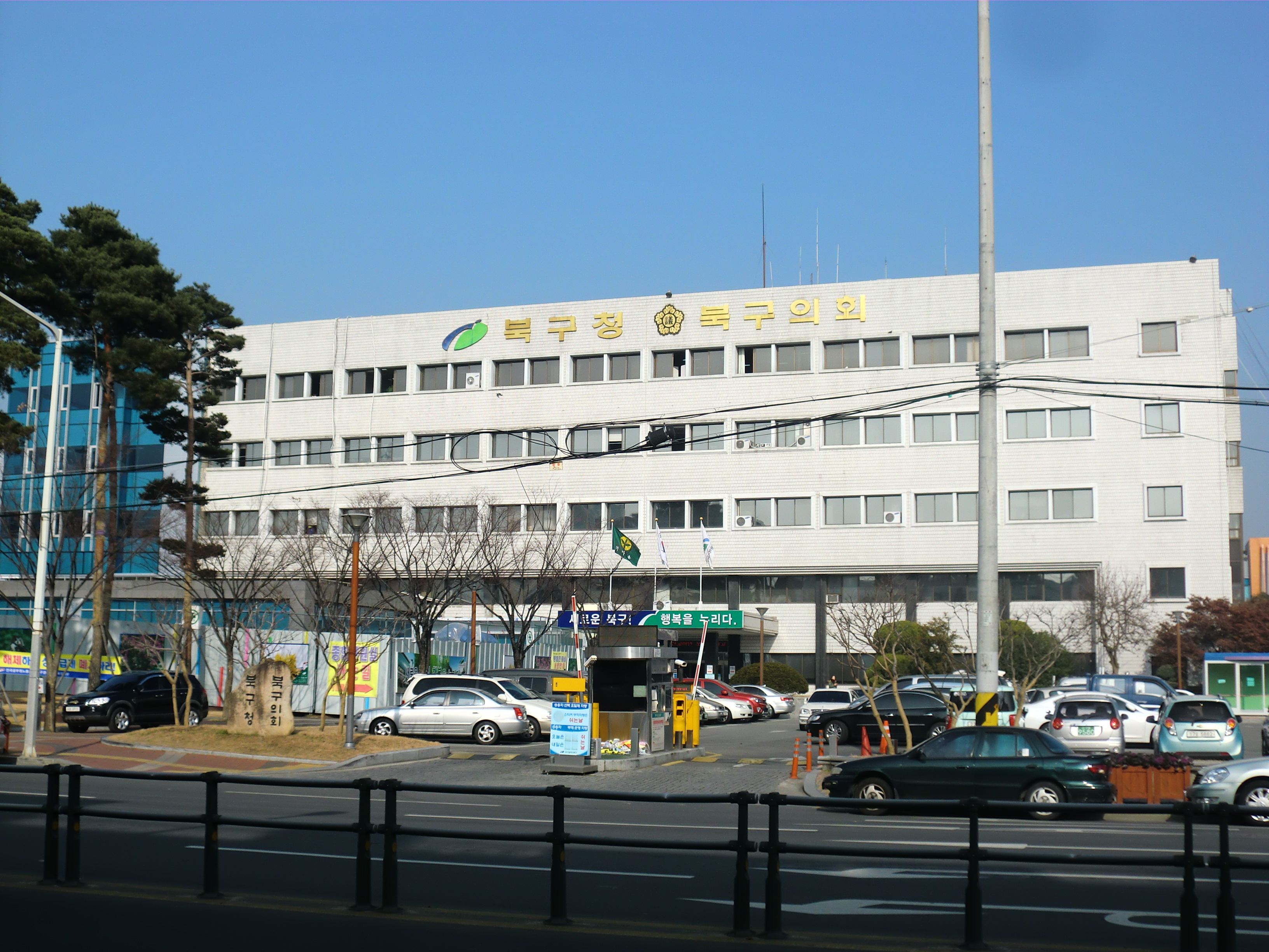 대구광역시 북구에 있는 북구청